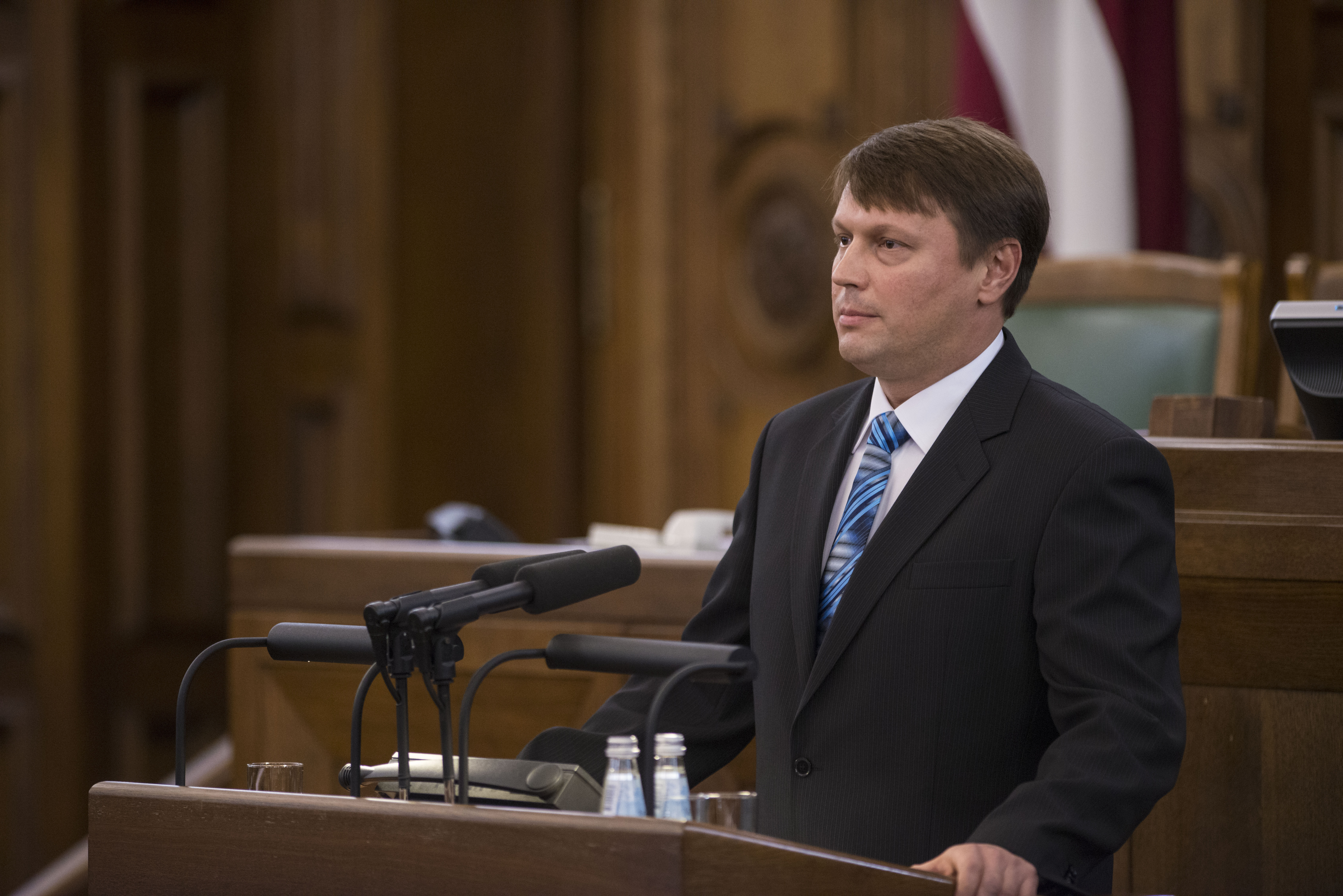 2014.gada 4.novembris. Deputāts Valērijs Agešins dod svinīgo solījumu. Foto: Juris Vīgulis, Saeimas Kanceleja Izmantošanas noteikumi: saeima.lv/lv/autortiesibas